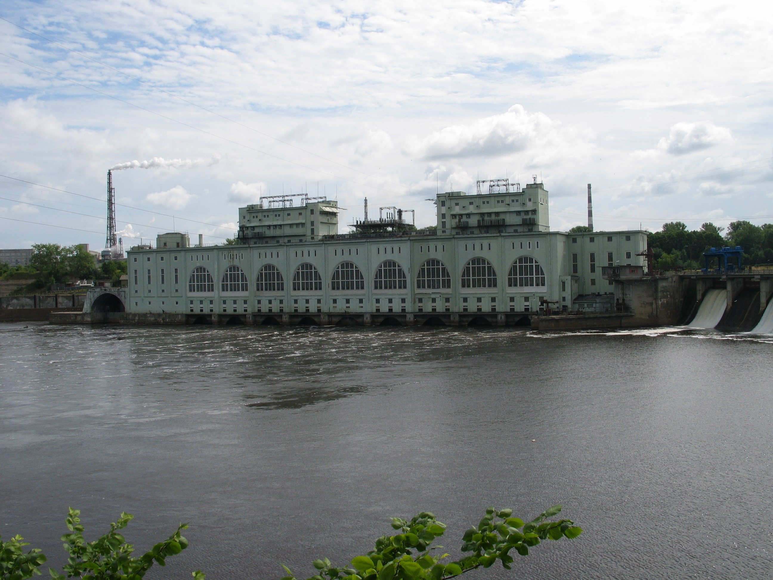 Волховская ГЭС